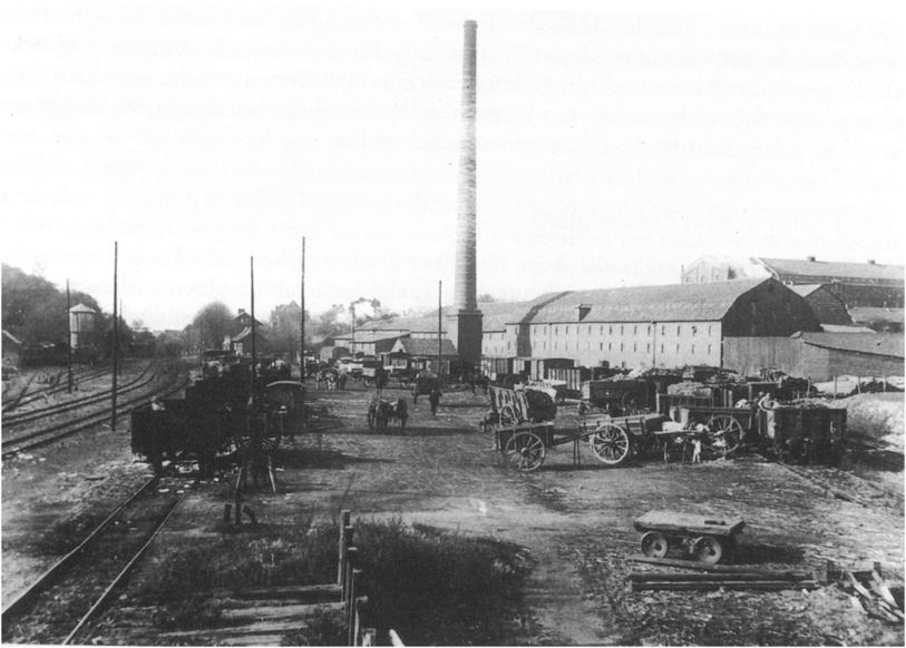 Foto Laumans Firmengelände mit neuer Schienenlogistik um 1911